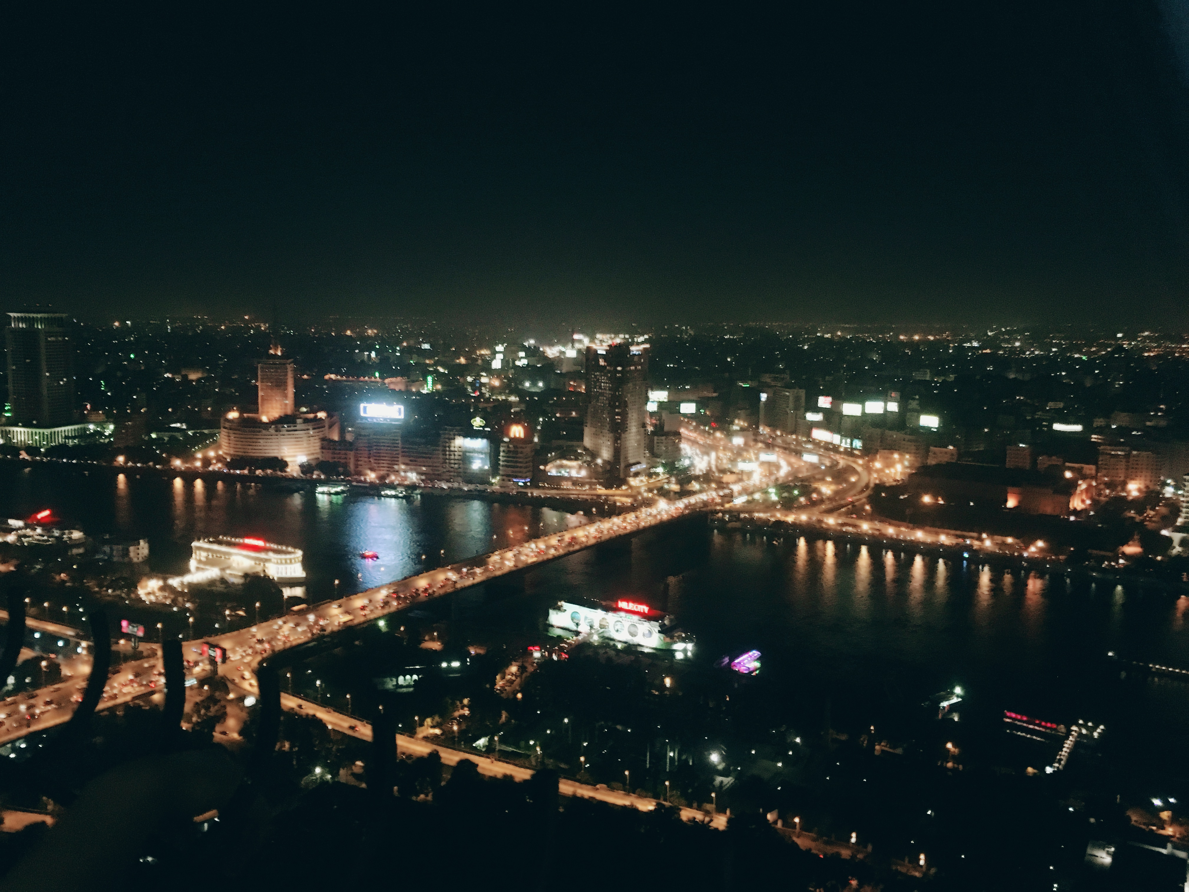 صوره من افضل الاماكن في القاهره و من اكثر الاماكن المحببه لسكان القاهره ،، الصوره من اعلي برج القاهره والمطله علي مبني الاذاعه و التلفزيون و نهر النيل و بعض الفنادق المطله علي النيل و المراكب النيليه الليليه ،،، اذا اردت الاستجمام و استنشاق هواء طلق نقي و الاستمتاع بالقاهره من الاعلي عليك الصعود الي هذا المكان الرائع بمعني الكلمه